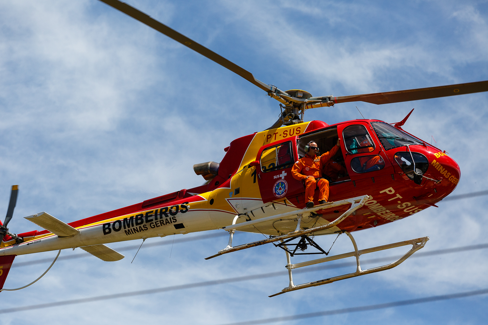 Wiki Expedição Brumadinho - Fevereiro de 2019 - Brumadinho - MG - Brasil.